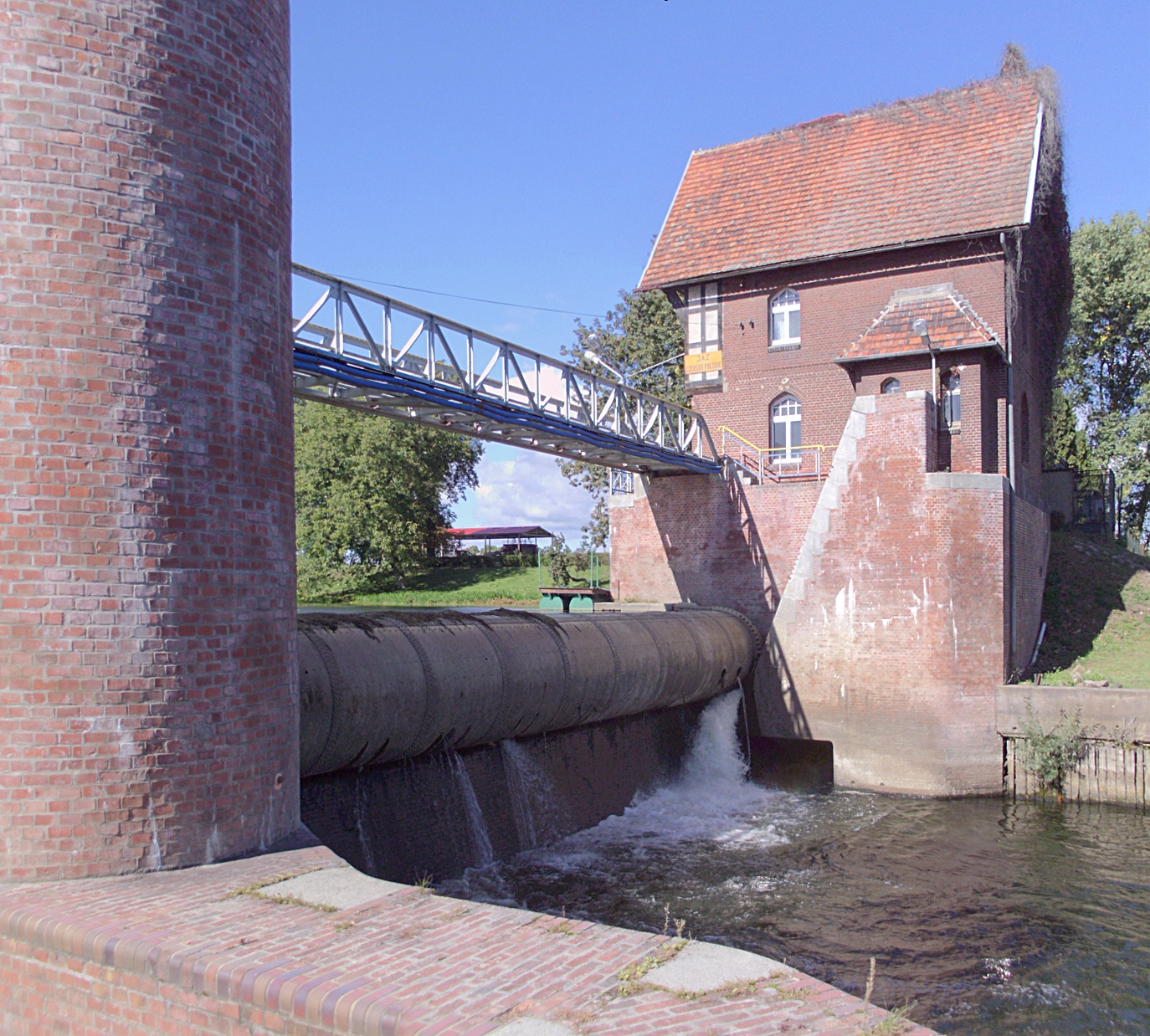 zespół Kanału Bydgoskiego (Starego i Nowego), 1773-1774, 1908-1815: szlak wodny z urządzeniami hydrotechnicznymi (9 śluz, 1 jaz) 6 budynków maszynowni 2 budynki sterowni 3 budynki obsługi 5 budynków mieszkalnych („dom śluzowego”) Bydgoszcz - Kanał Bydgoski (zabytek nr rejestr. A/900/1-27)